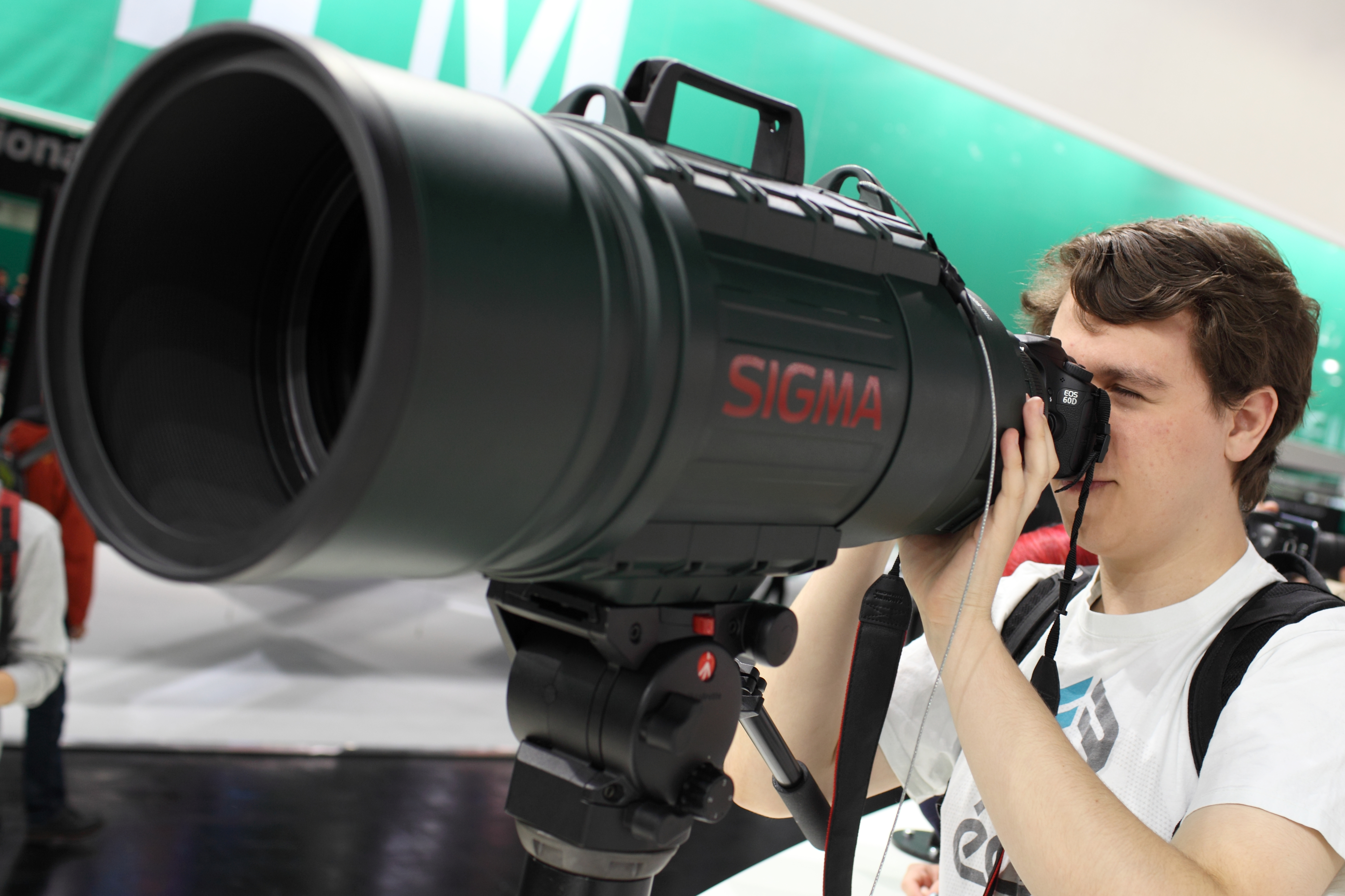 Telelens van Sigma